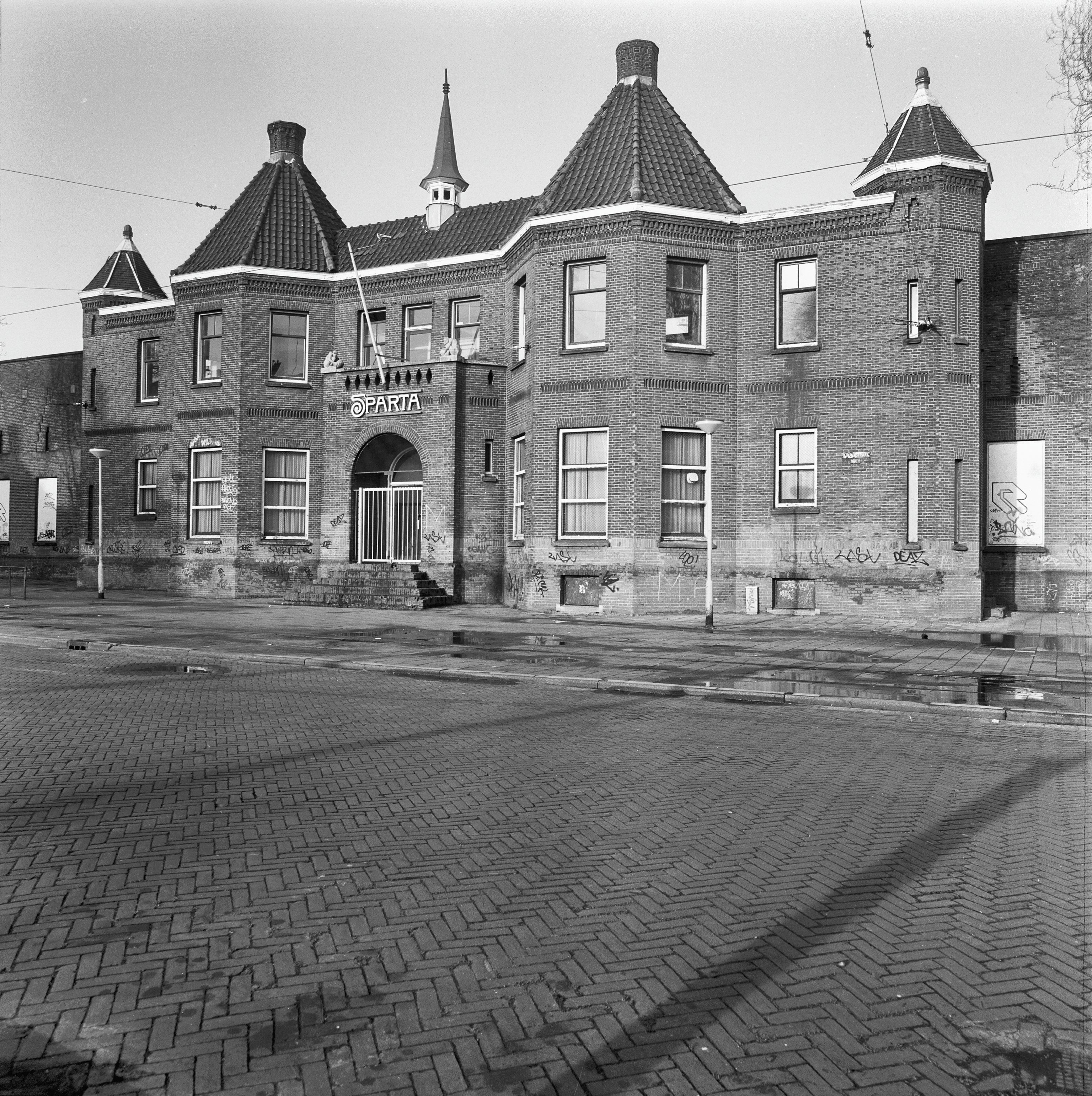 STADION (SPARTA) / CLUBGEBOUW SPANGEN: Exterieur OVERZICHT CLUBGEBOUW